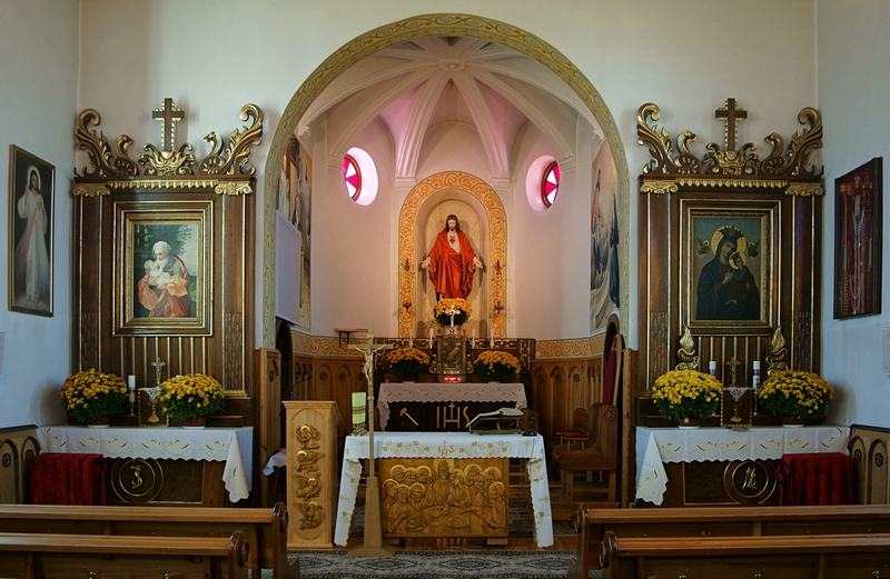 Nawa główna kościoła w Gródku (białostockie)